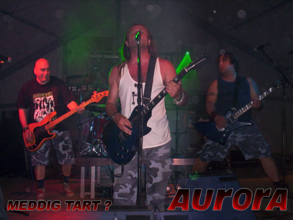 Koncerten az Auróra (montázs, Meddig tart?-turné, 2005)